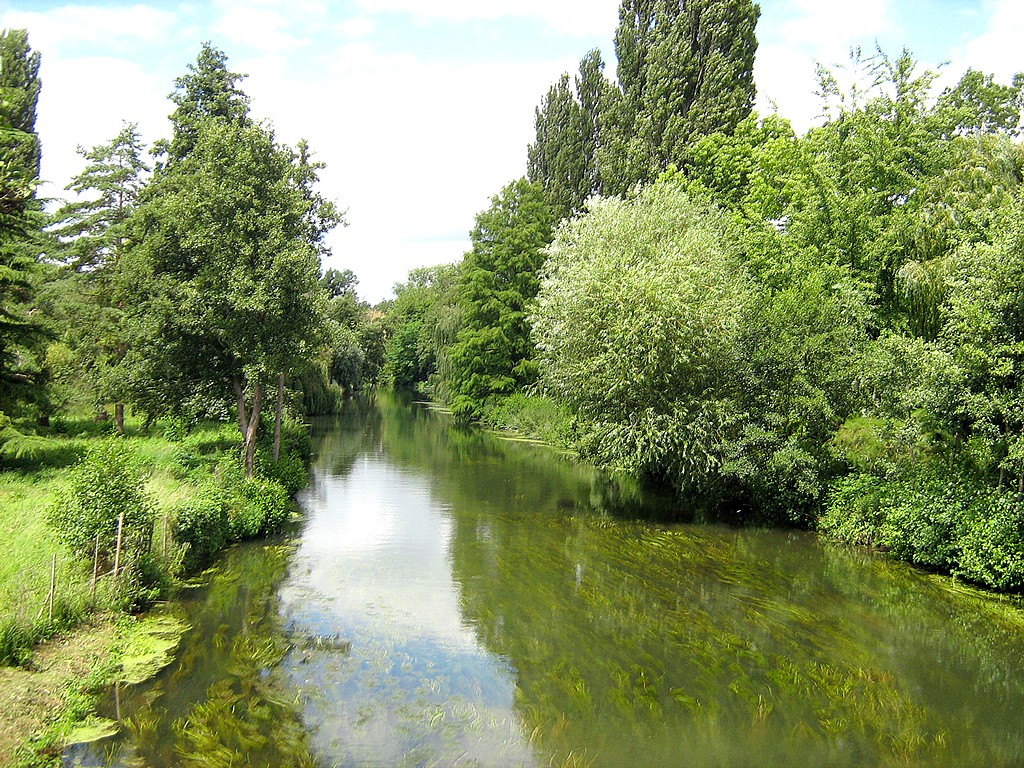 L'Eure sous le pont de Cherisy.